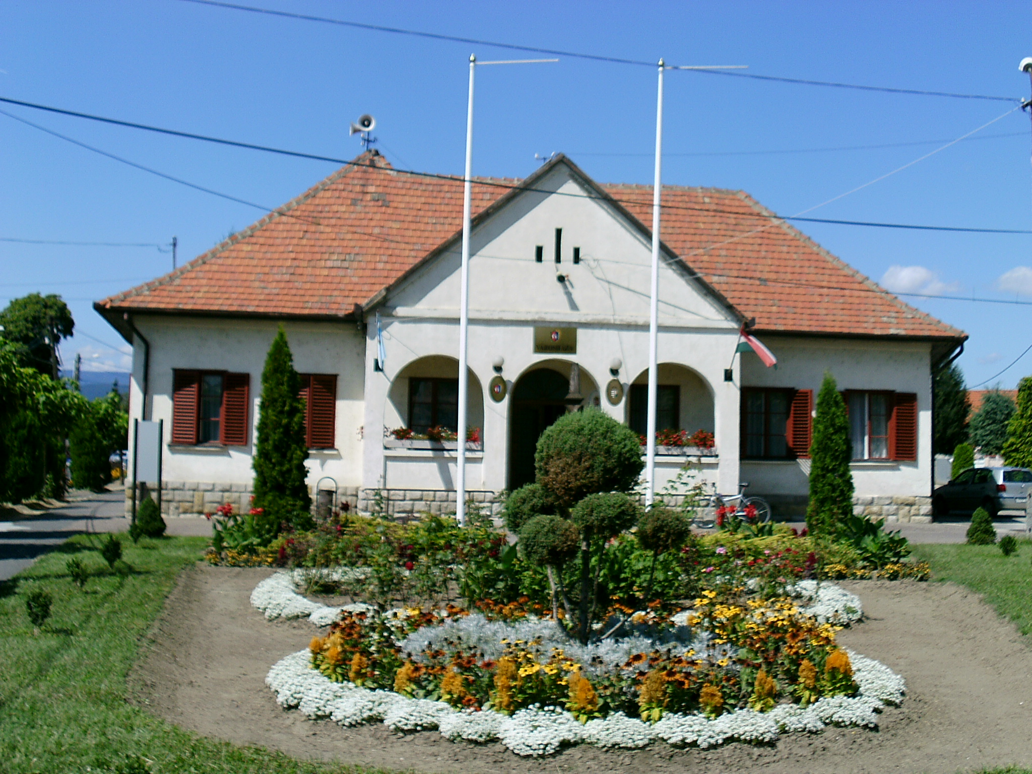 Városháza Verpeléten